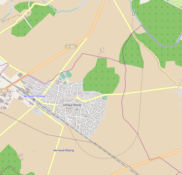 Carte de Verneuil.